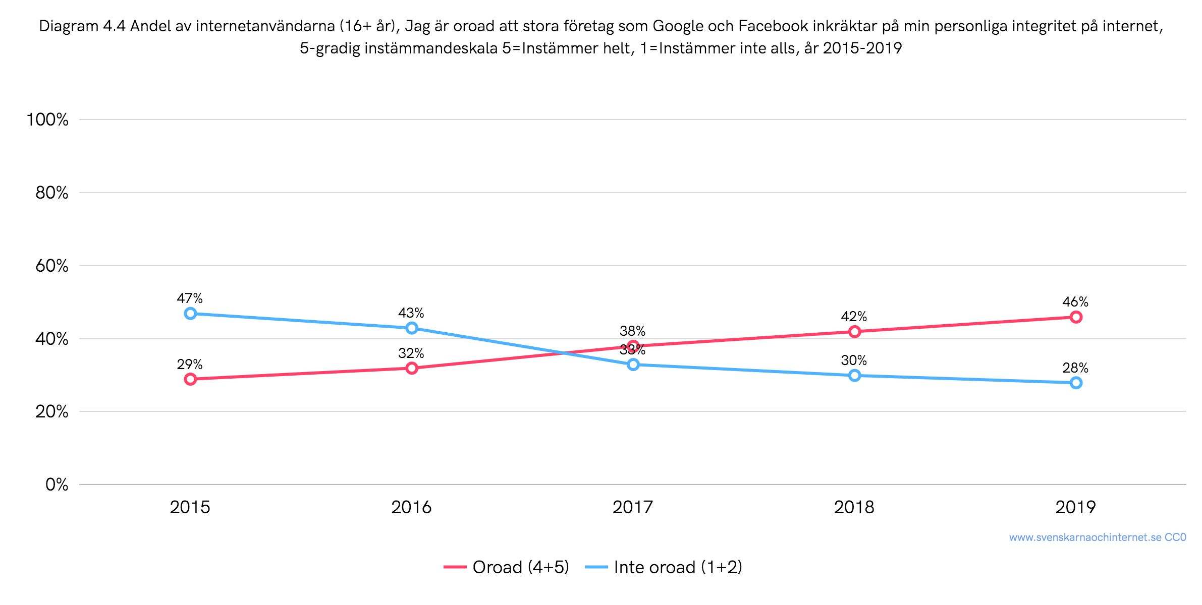 Andel av de svenska internetanvändarna (16+ år) som är oroad över att stora företag som Facebook och Google inkräktar på den personliga integriteten på internet. 5-gradig instämmande skala, 5 = instämmer helt, 1 = instämmer inte alls. Åren 2015–2019. Siffror från undersökningen "Svenskarna och internet".